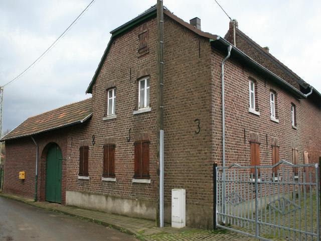 Backsteinhof in Wegberg-Gripekoven